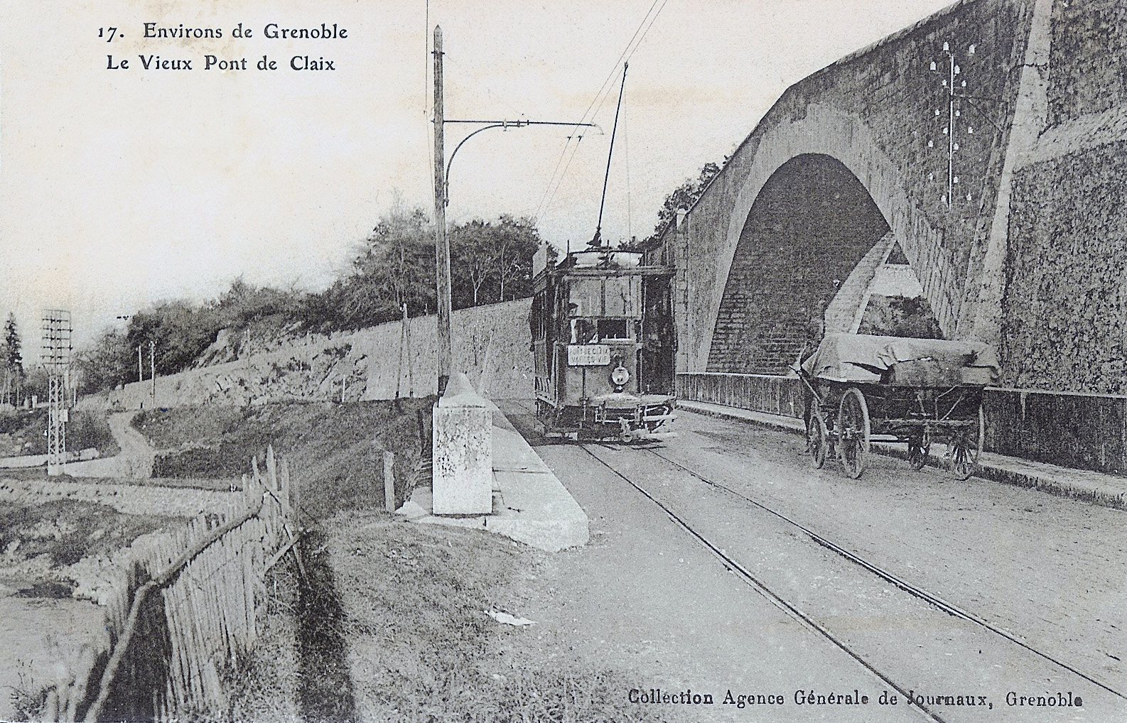 Tramway de la SGTE qui traverse le Drac à Pont de Claix